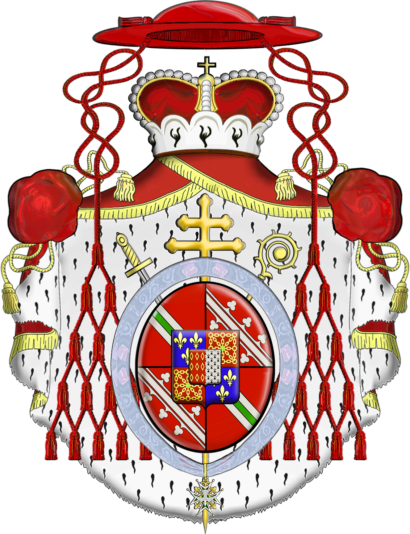 Grandes armoiries des cardinaux Louis-René-Édouard de Rohan & Louis-Constantin de Rohan